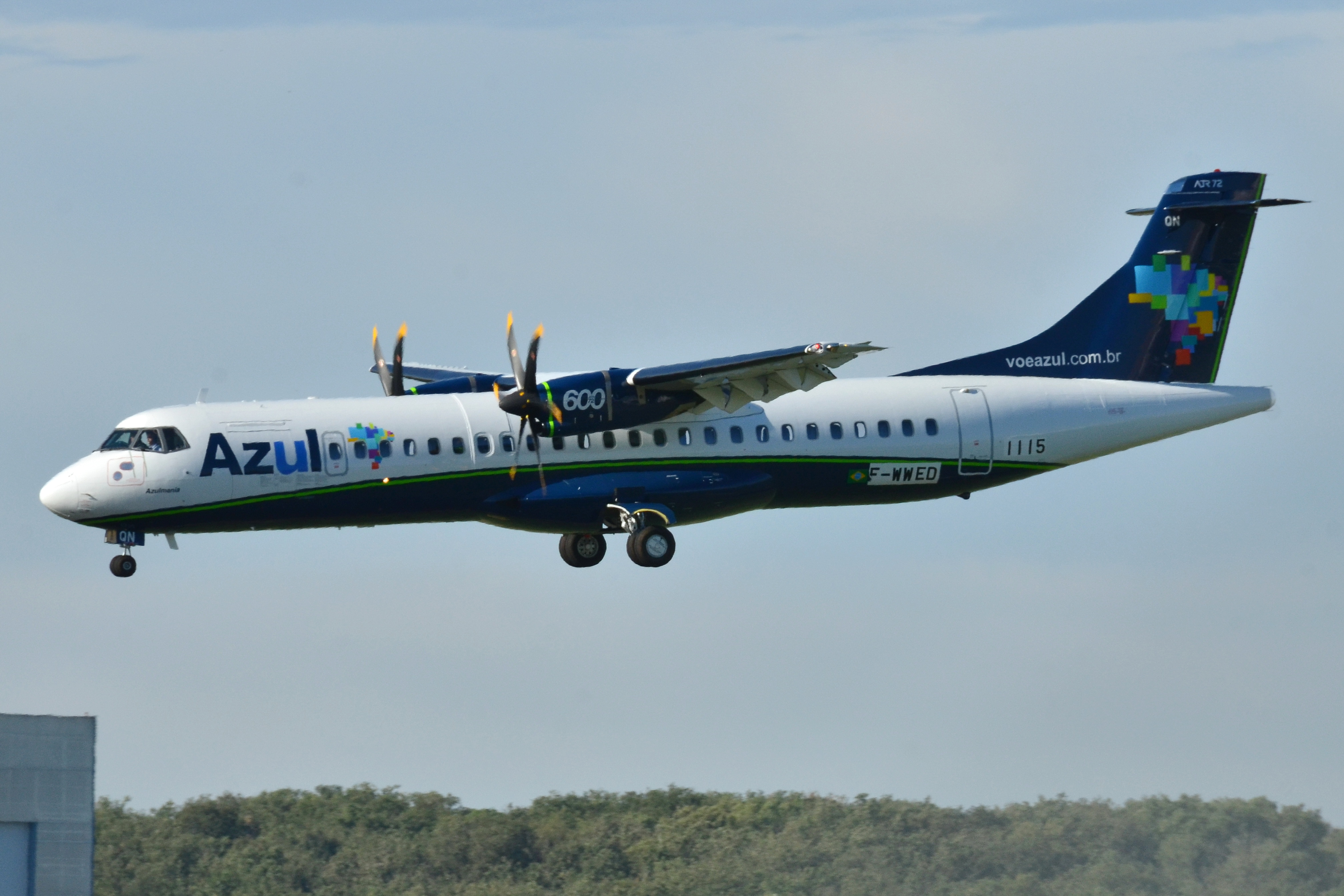 Photo prise à l'aéroport de Toulouse-Blagnac (LFBO) en France. Picture take at Toulouse-Blagnac Airport (LFBO) in France.